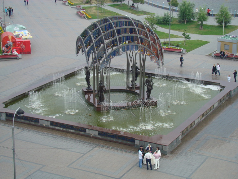 Fontano en la Cvetnoj bulvardo. Tjumeno, Rusio.